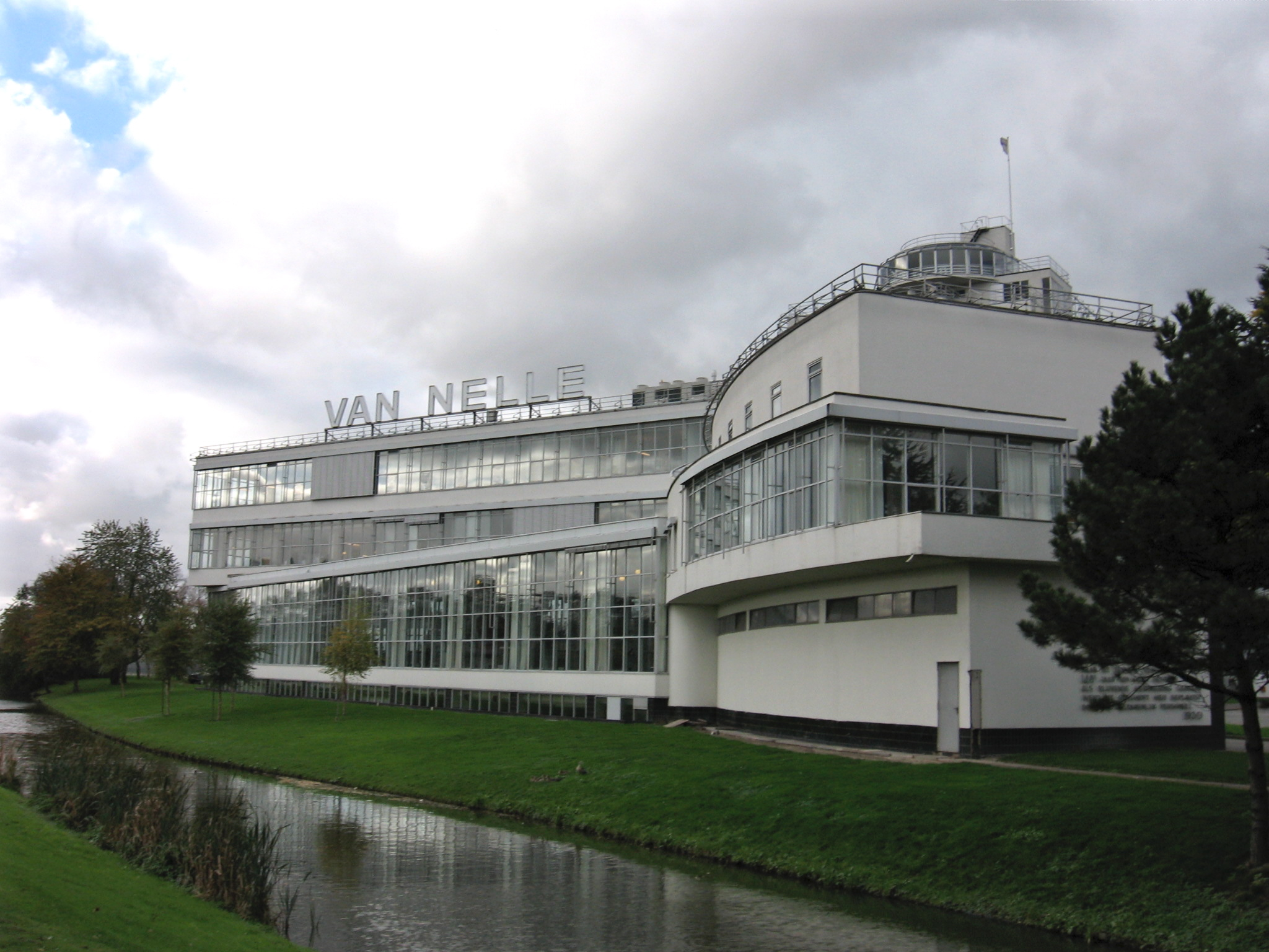 Van Nelle, Overschie